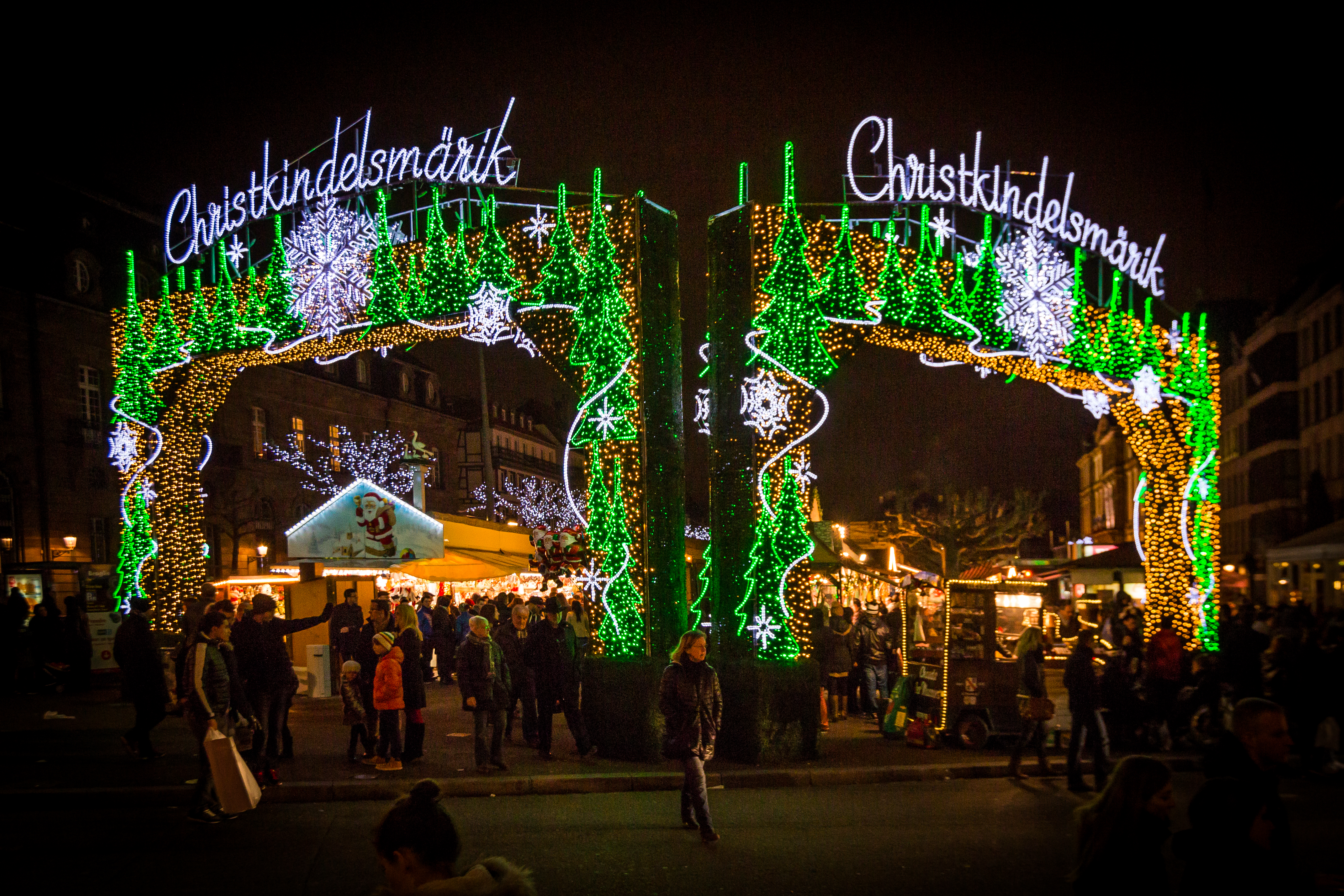 Portail d’entrée lumineux du marché de Noël de Strasbourg, place de Broglie. En alsacien, Christkindelmarik / marché de l’enfant Jésus.